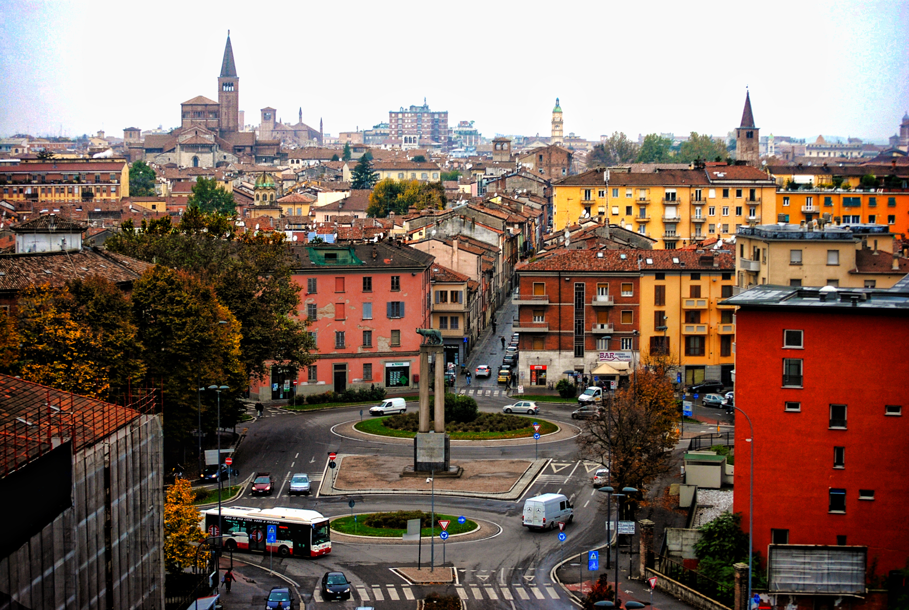 Monumento alla Lupa This is a photo of a monument which is part of cultural heritage of Italy.